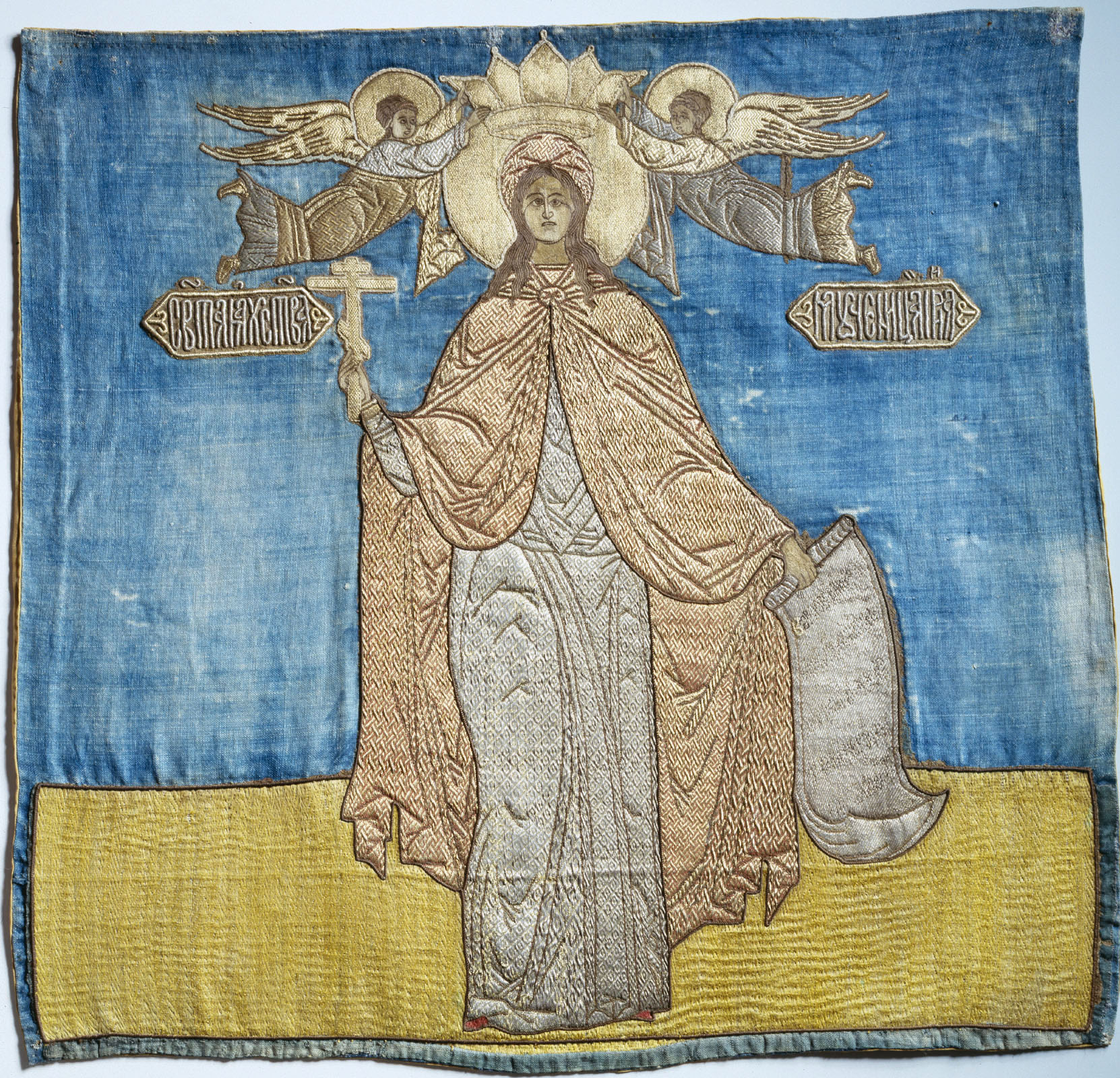 Пелена «Мученица Ирина» Пелена русского православного шитья, изображающая Св. Мученицу Ирину. Москва. 1598 - 1604. Мц. Ирина. Мастерская Ирины Годуновой. Шитьё. Москва. 1598 - 1604 гг. 68 х 70,5. Из Кирилло-Белозерского монастыря. ГРМ. Спб.